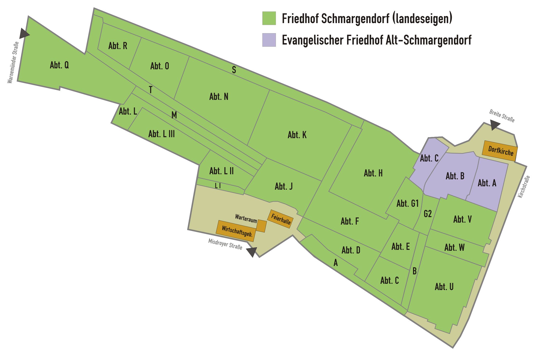 Friedhof Schmargendorf (landeseigen) und Evangelischer Friedhof Alt-Schmargendorf in Berlin; Plan der Abteilungen